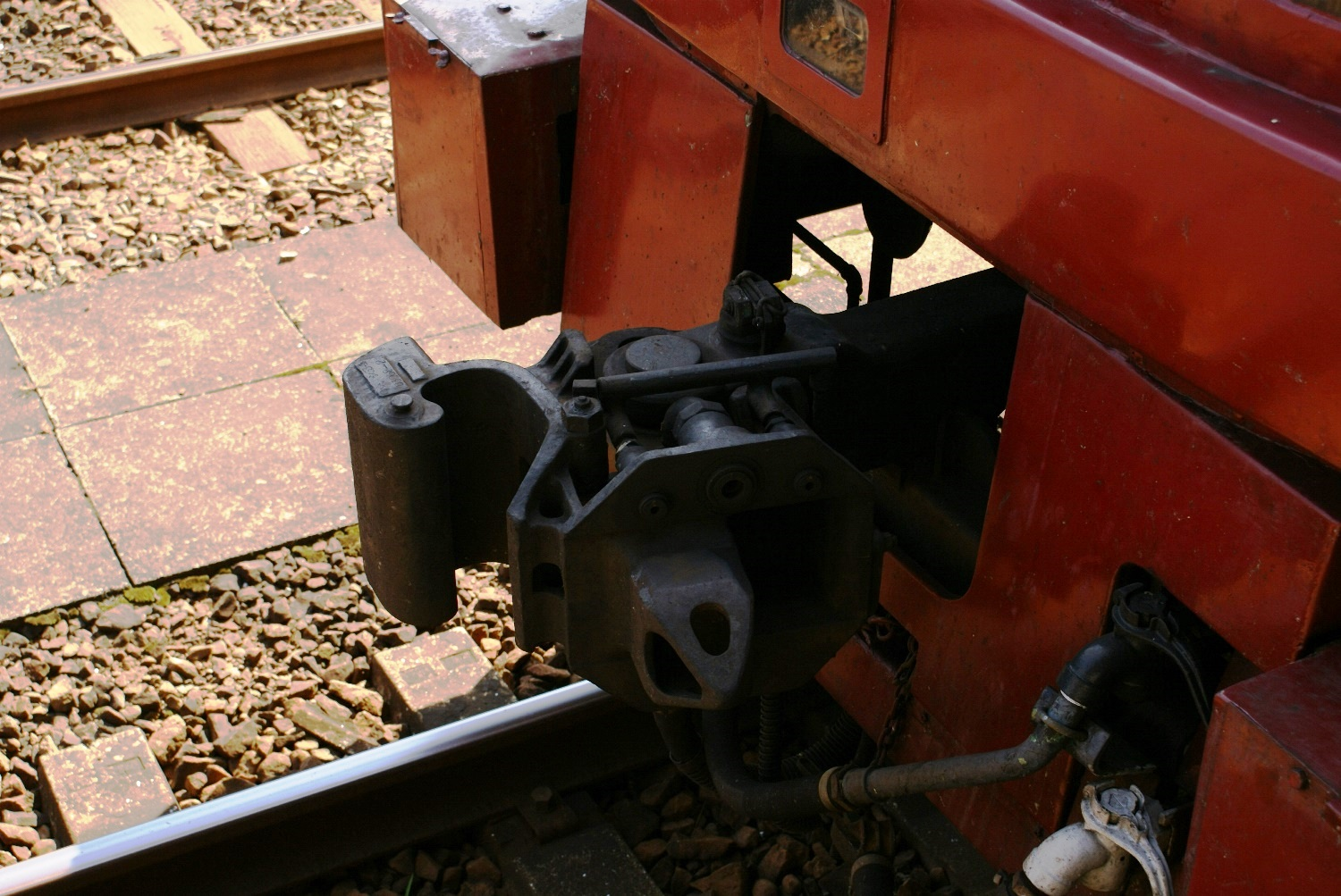 JR九州仕様の双頭連結器